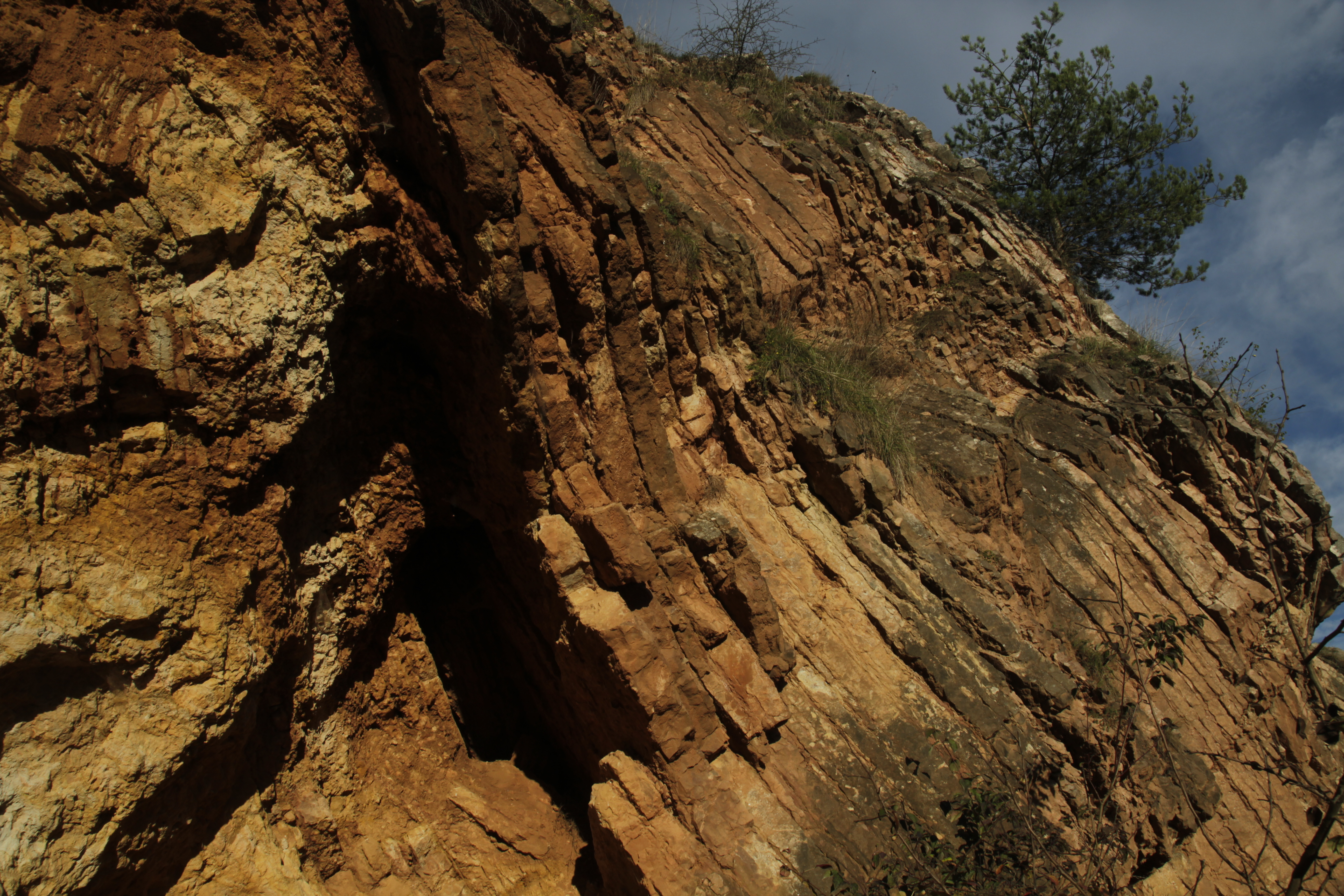 Vápencové vrsvy v Červeném lomu